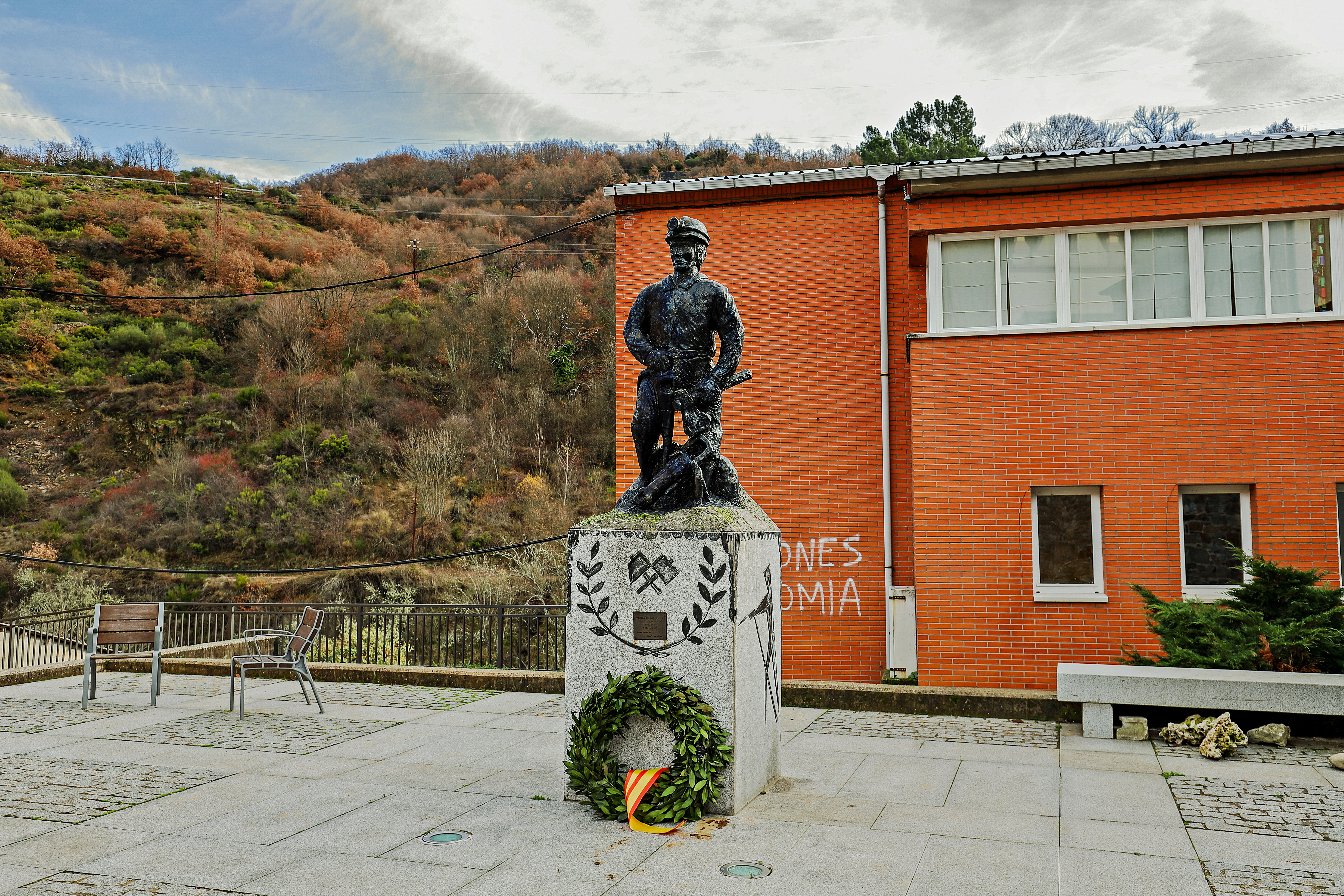 Matarrosa del Sil es una localidad que pertenece al municipio de Toreno, en la comarca de El Bierzo, provincia de León.